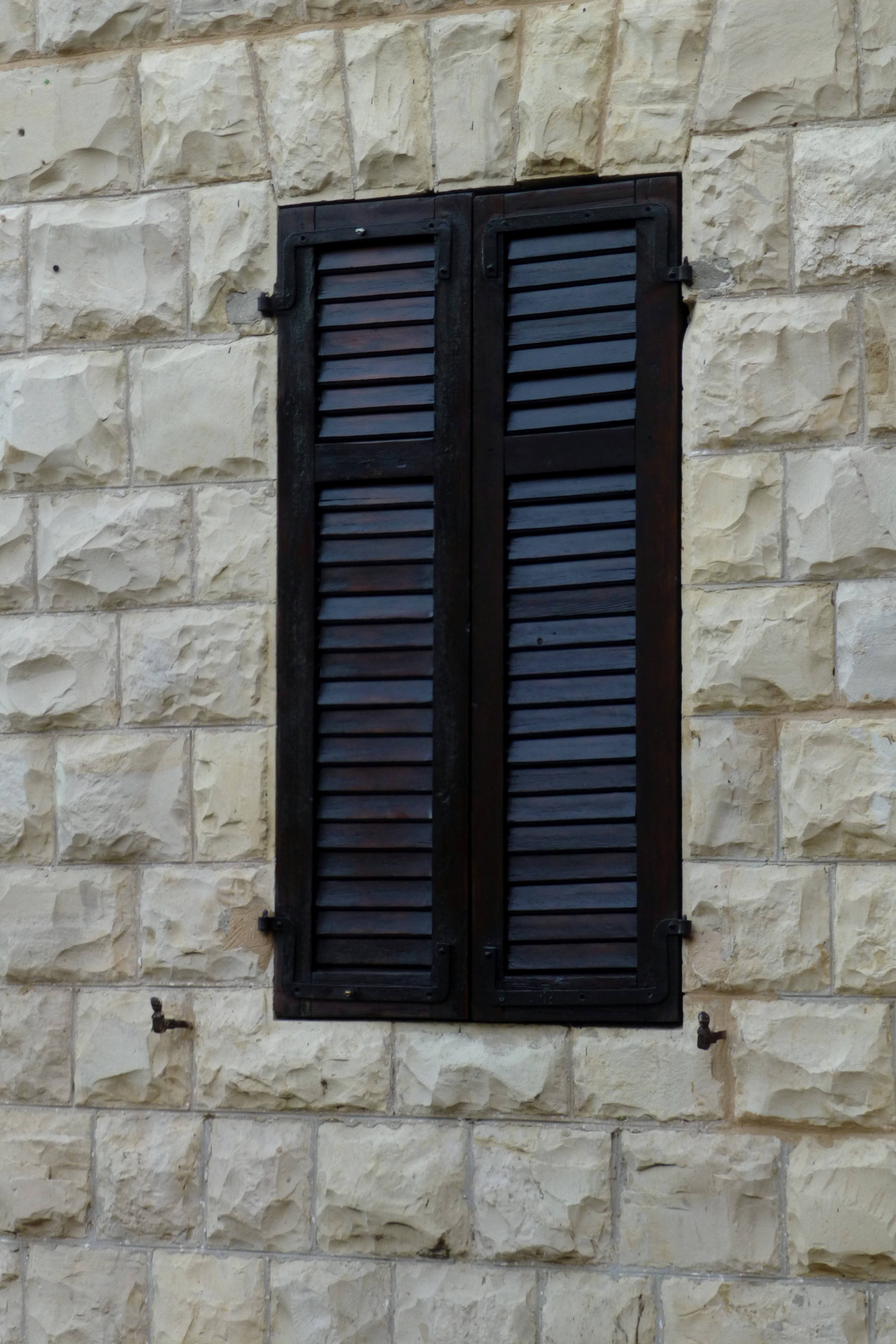 בית הרמן שטרוק, רח' ארלוזרוב 23, חיפה